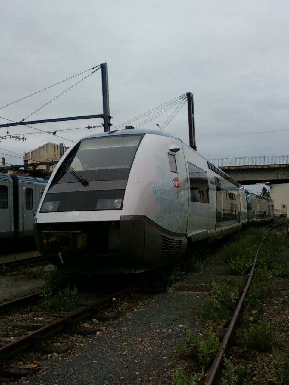 X 73773 au dépôt d'Agen en avril 2011